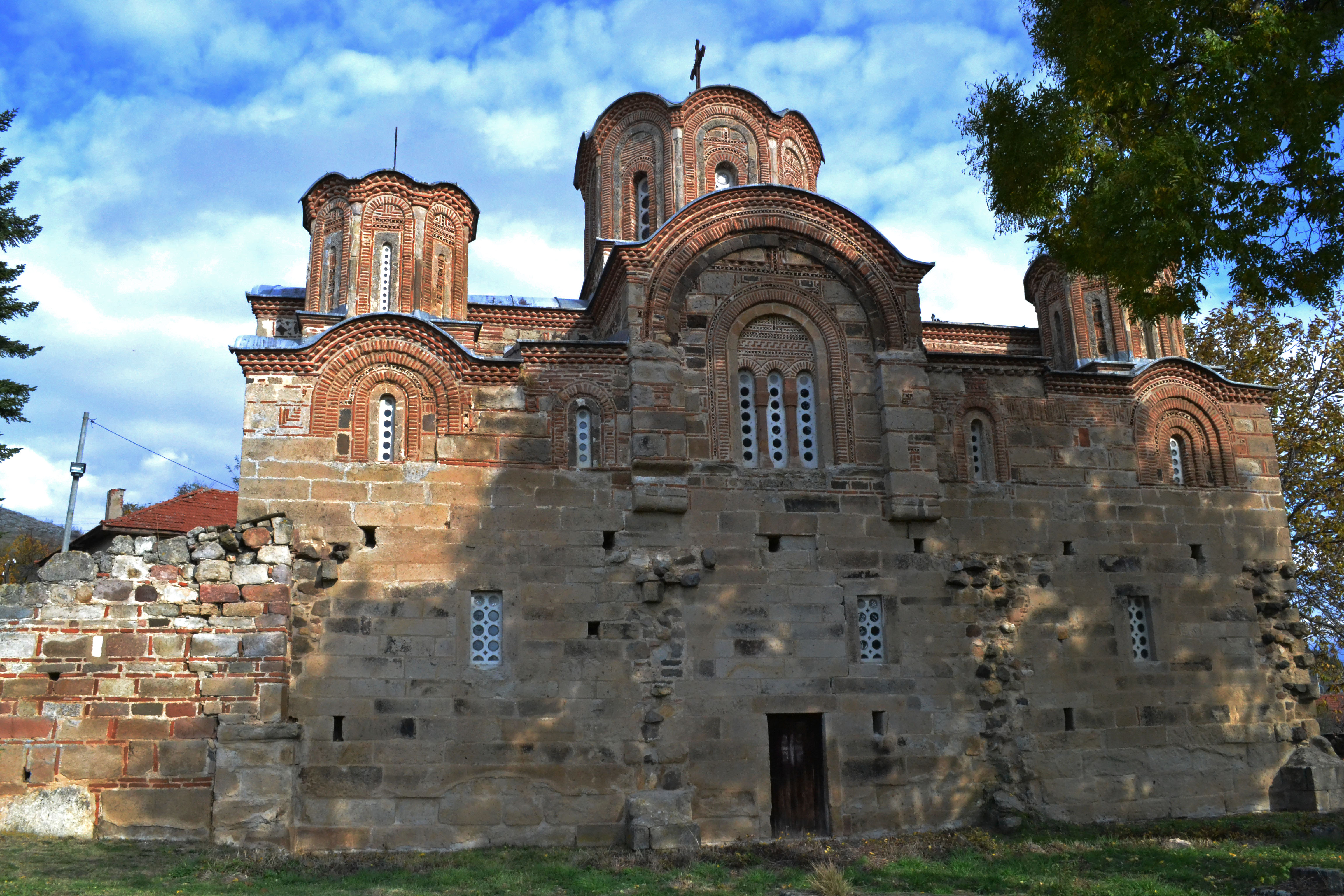 Црква Св.Великомаченик Горгиј